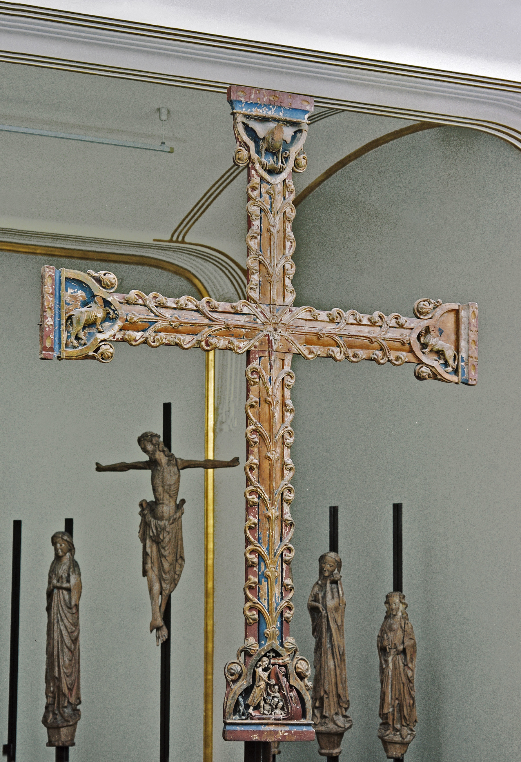 Foto av «Borrekorset» kopiert fra Universitetesmuseenes fotoportal på unimus.no der bildet har følgende beskrivelse: Emneord: The Medieval Sculpture Collection Motiv: Borre; Cross. Kors, kristusfiguren mangler. Korset er dekket av vinranker. Korsarmene er dekorert med treflikede medaljonger. De tre øverste inneholder utskjærte symbolder for evangelistene, det nederste viser Kristus i limbus. Korset har ingen naglehull etter en festet kristusfigur. Gjenstand: krusifiks Tid/Periode: Middelalder Sted: Norge, Vestfold, HORTEN, BORRE PRESTEGÅRD, 15 Fotograf: Eek, Ann Christine Bestillingsnr: Cf25878_16_C6130 Museumsnummer: C6130 Lisens: CC BY-SA 4.0 Lokalitet ("lokid" i Askeladden): 75510